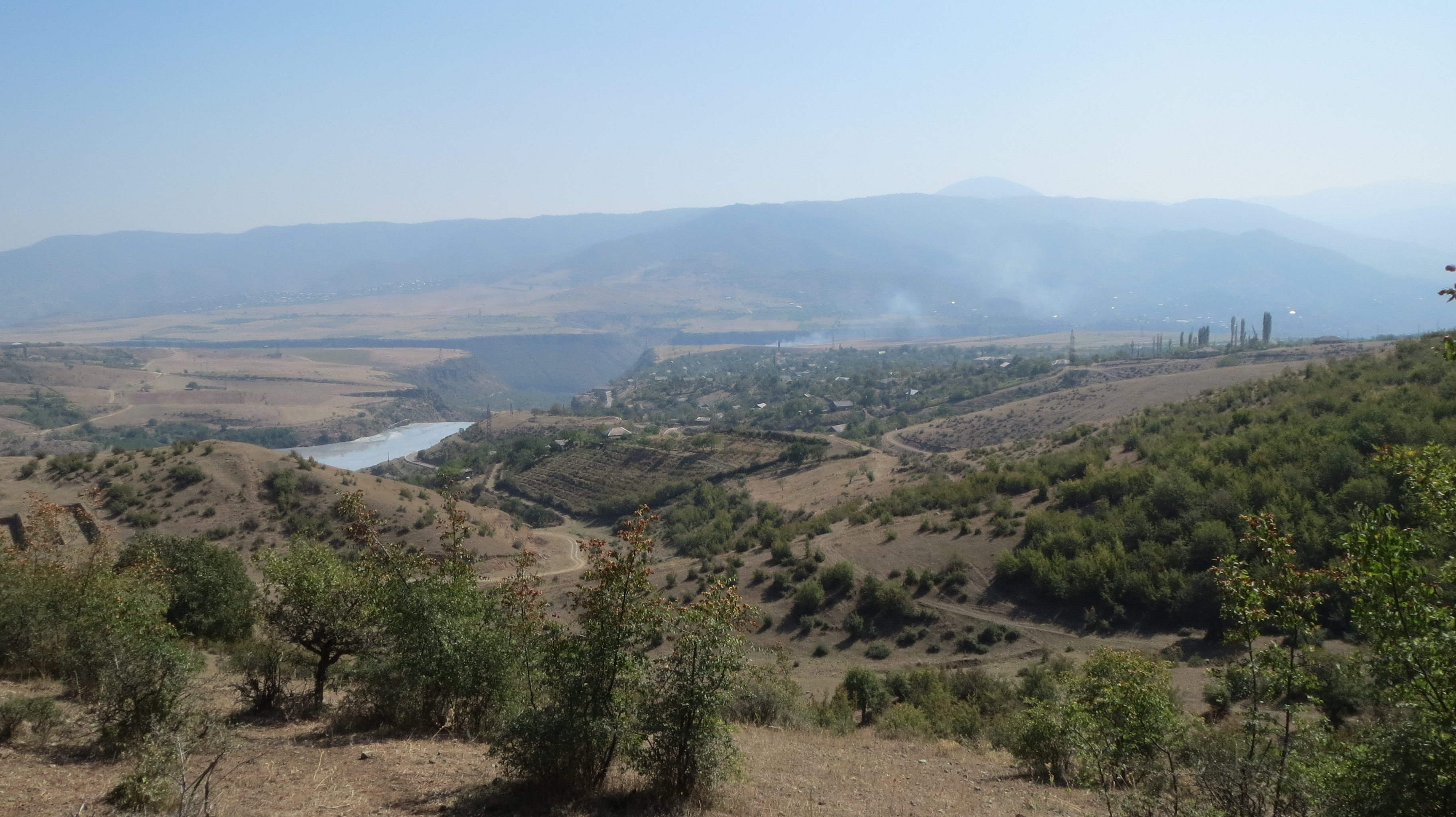 համայնապատկեր